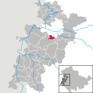 Wolfsburg-Unkeroda in Thuringia - Wartburgkreis